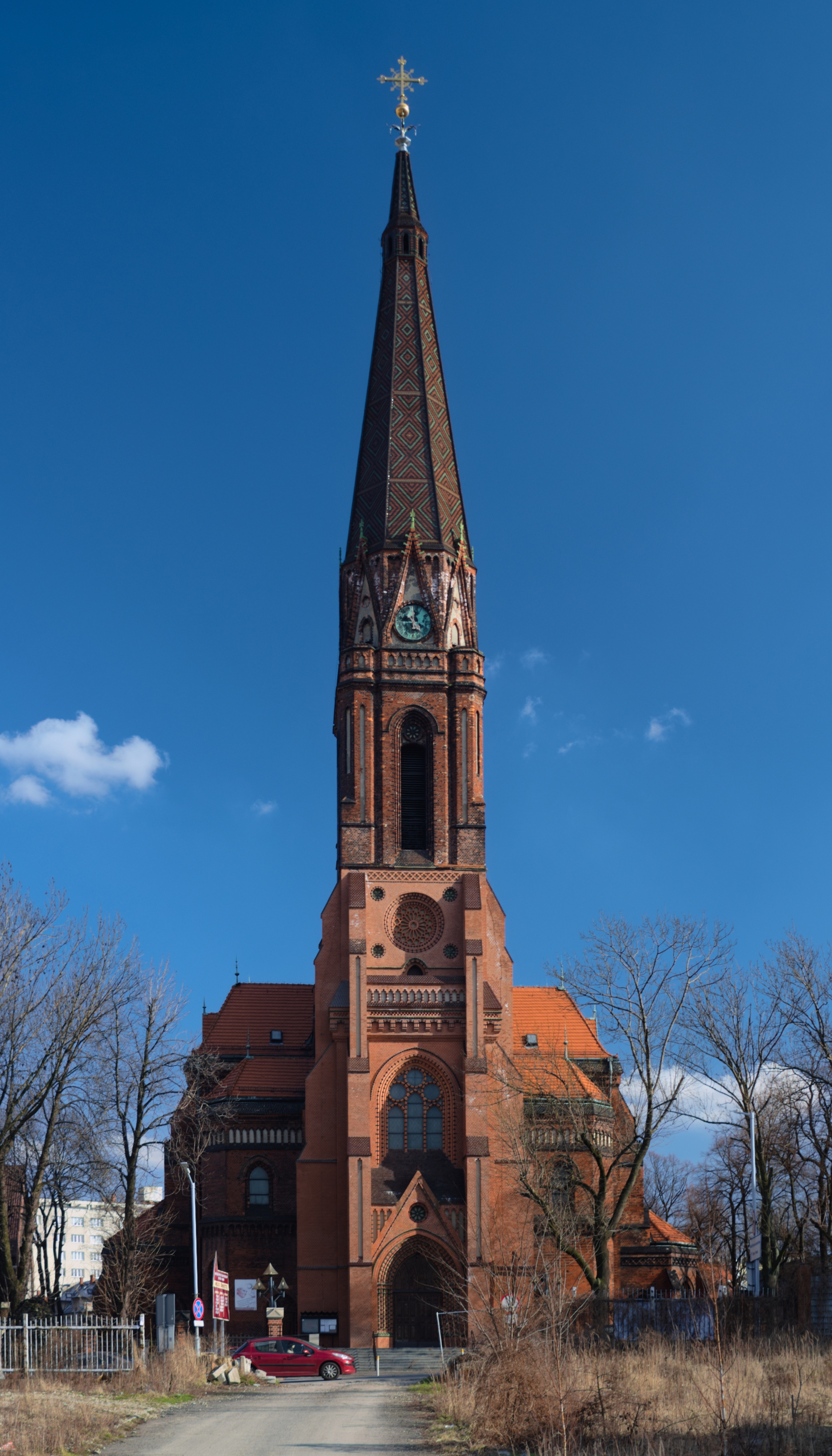 fasada kościoła świętych apostołów Piotra i Pawła w Katowicach, widok z południowego wschodu